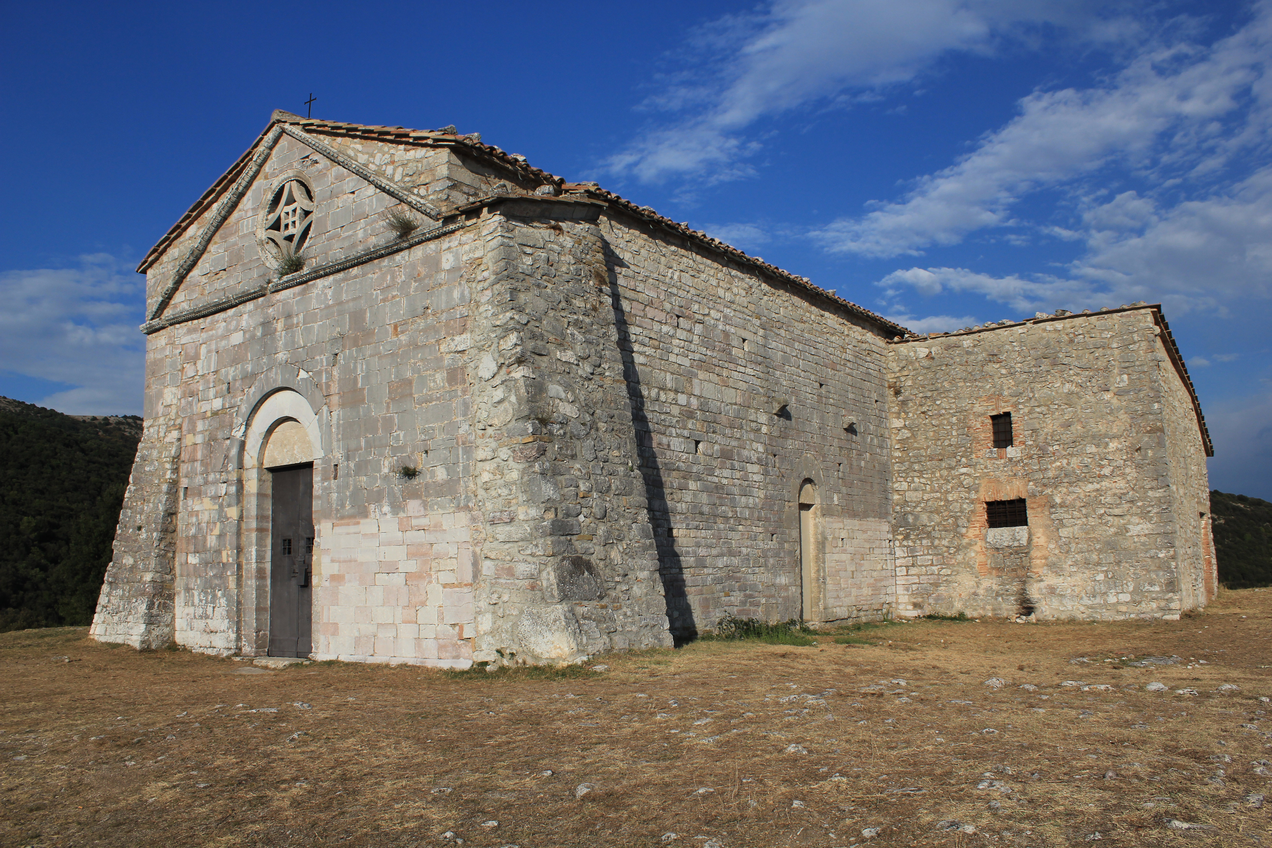 Chiesa benedettima di Sant Erasmo di Cesi (TR)